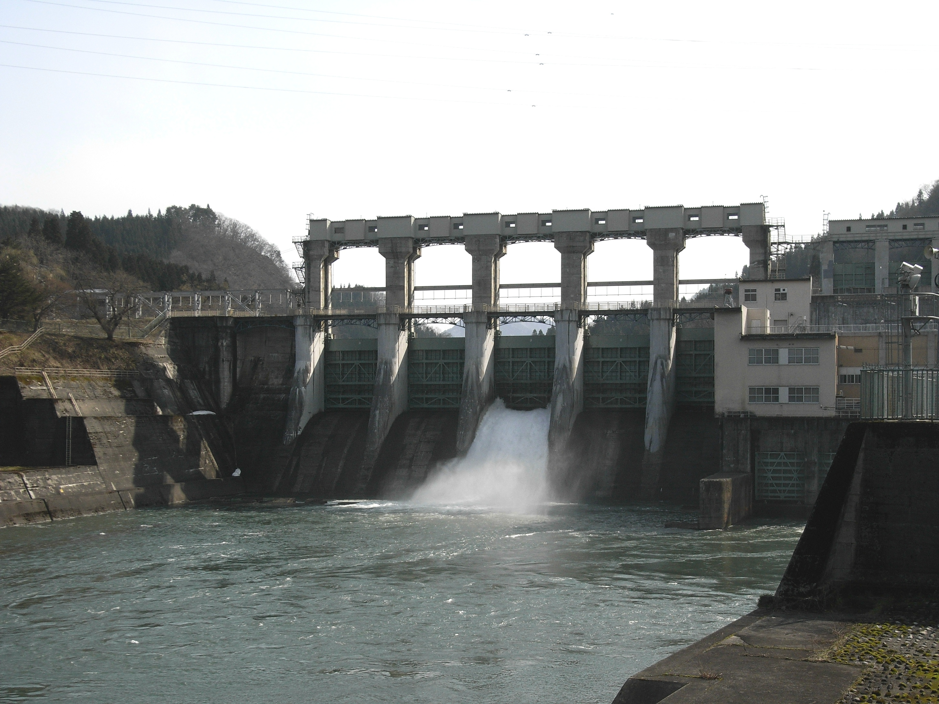 Dam